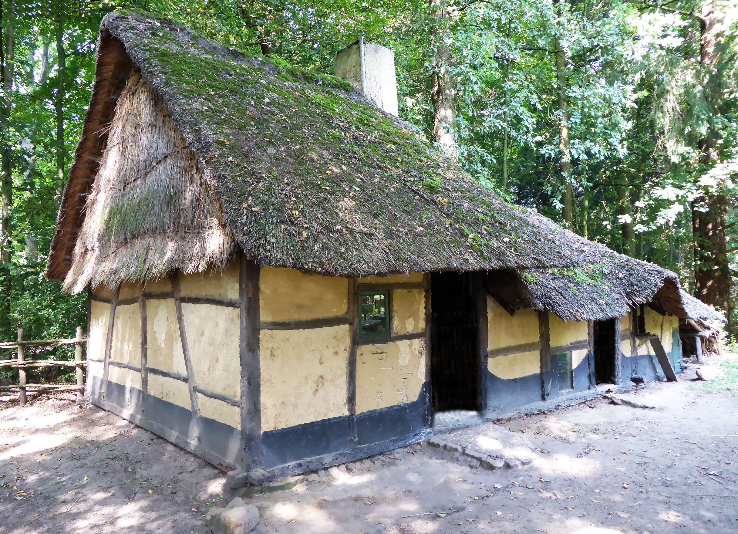 Kelderhut in het Openluchtmuseum Bokrijk Genk